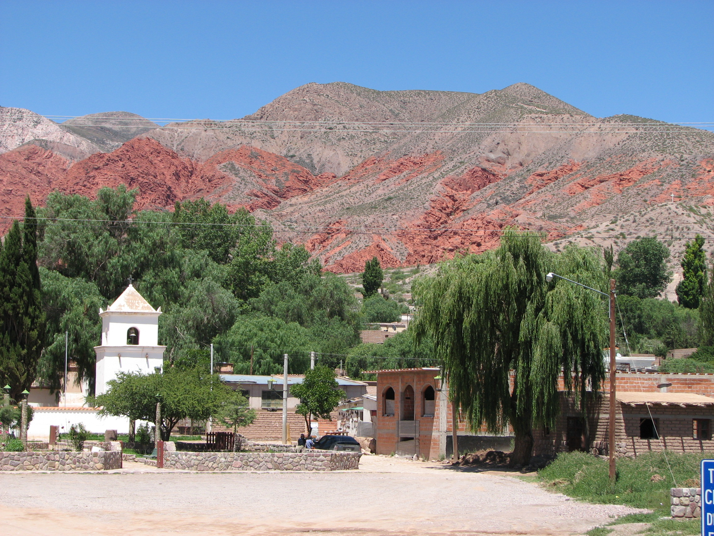 Le village d'Uquia, dans la quebrada de Humahuaca (province de Jujuy, Argentine)